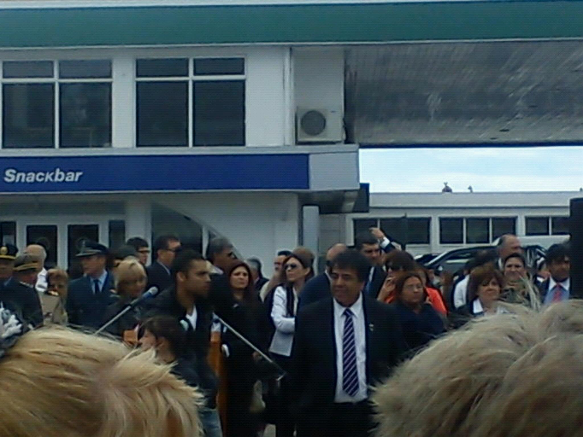 Ruben contreras diputado en el aniversario de la ciudad